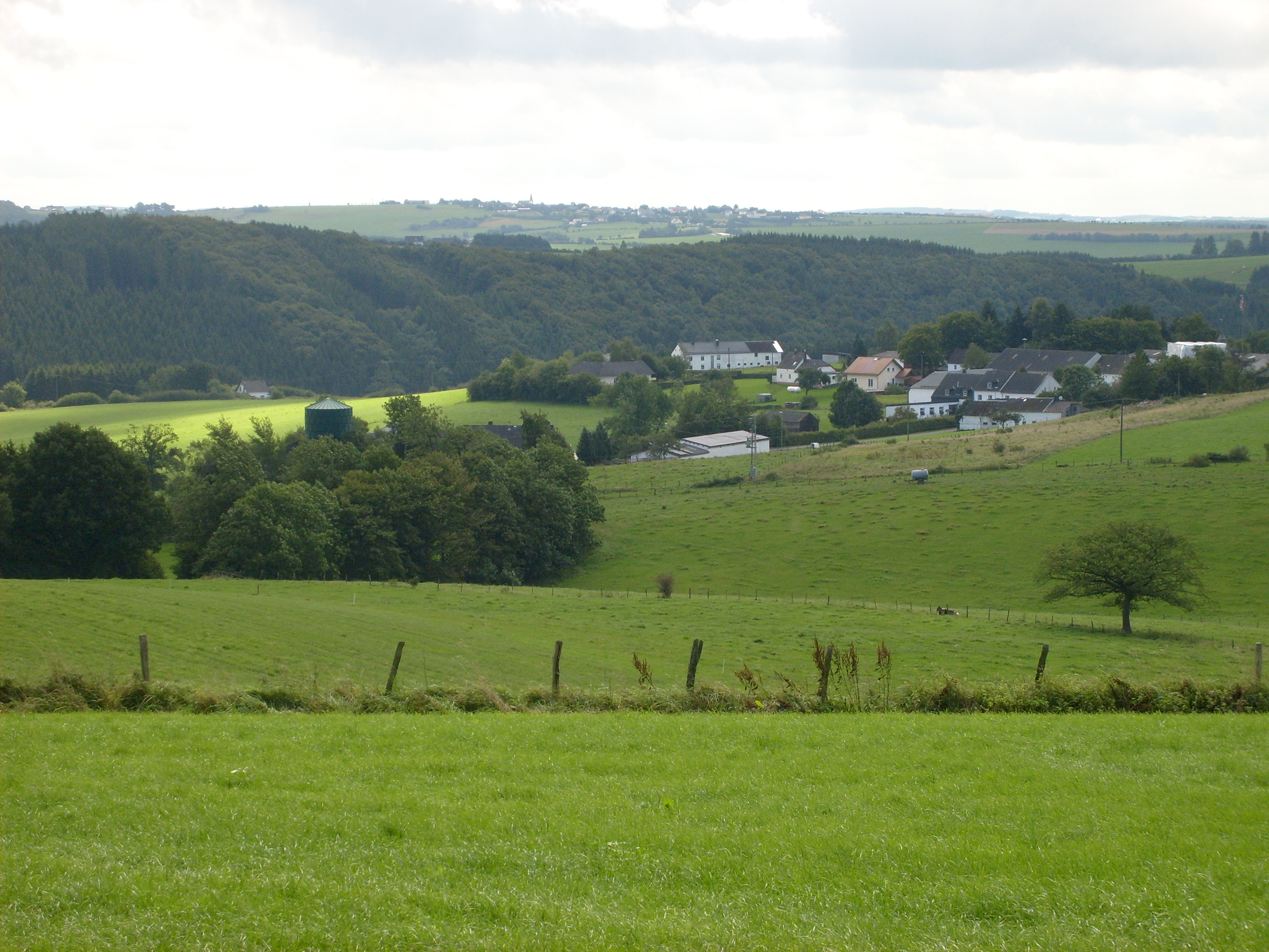 Mützenich Ortsansicht